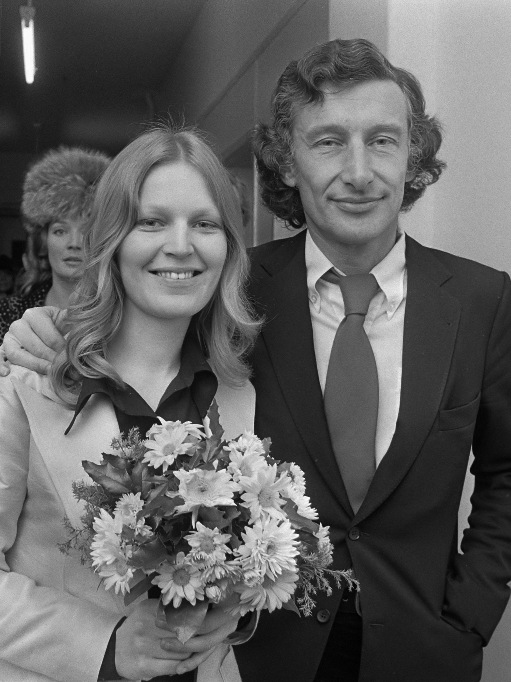 Schrijver Harry Mulisch trouwt met Sjoerdje Woudenberg op stadhuis Amsterdam, Mulisch met echtgenote 3 december 1971